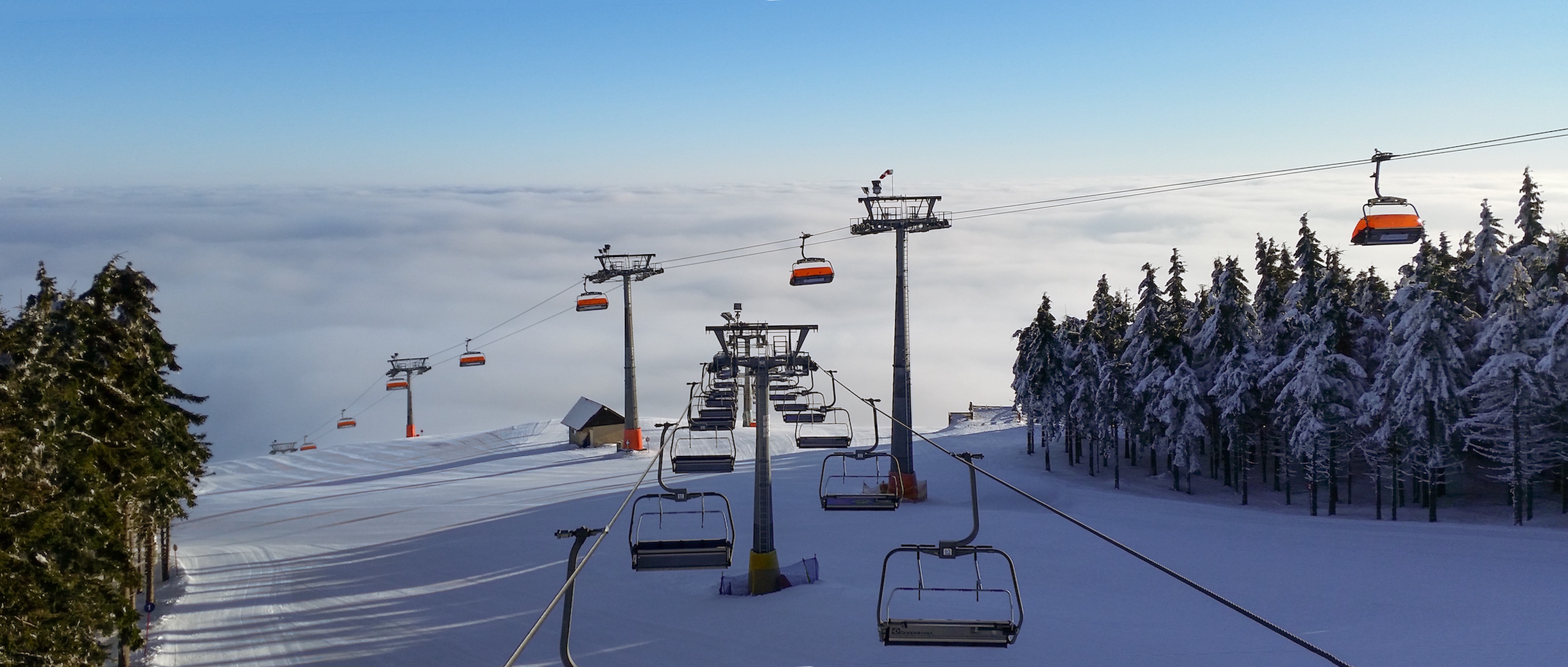 Specyficzny mikroklimat Zieleńca sprawa, że jest to miejsce wyjątkowe